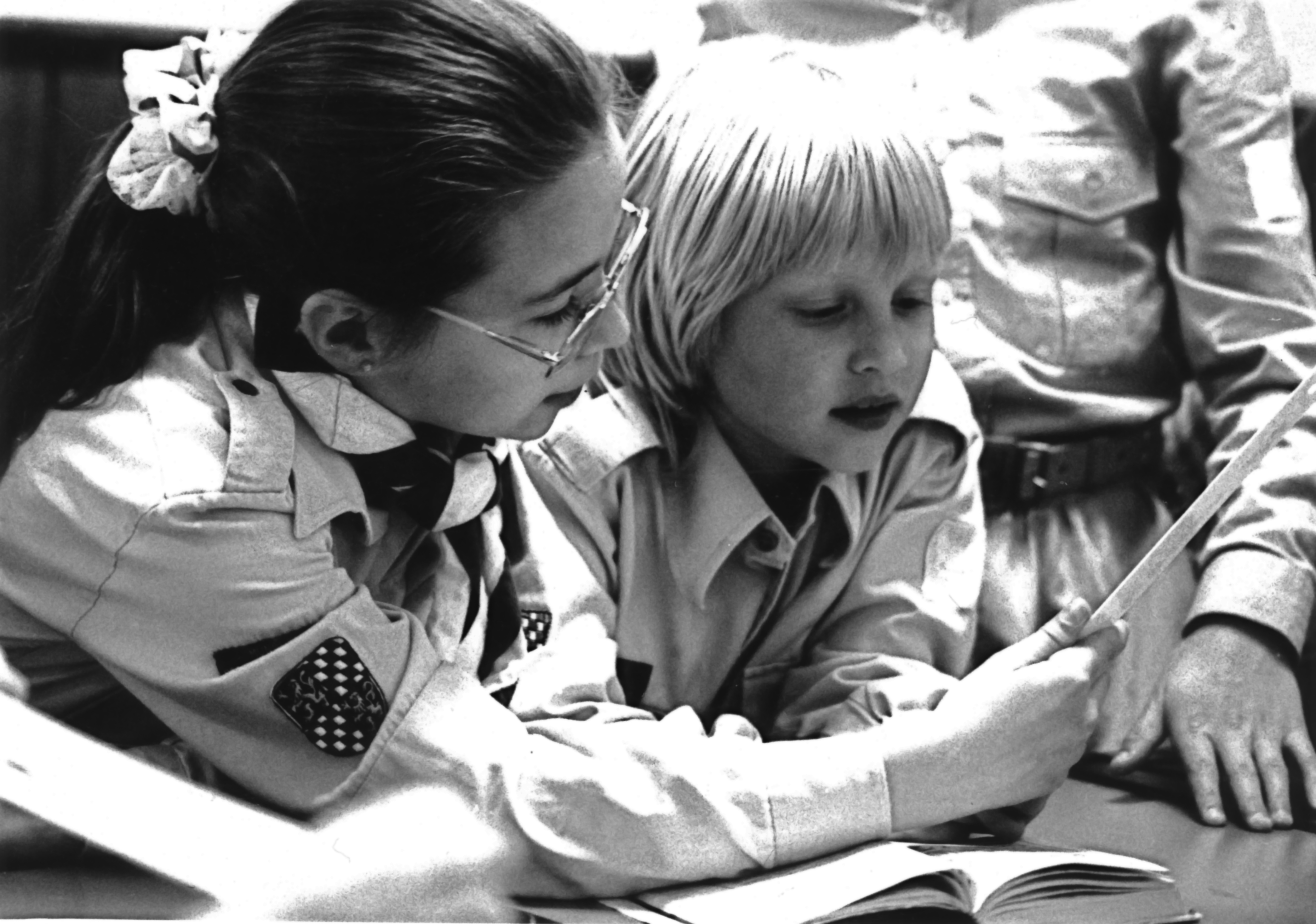 Pfadfinder-Mädchen der Katholischen Pfadfinderschaft Europas an der Pfarrei Maria Schutz, Pasing, München. Aufnahme im Rahmen eine Photoprojekts während meines Studiums.